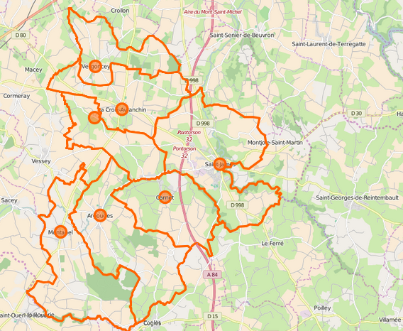 carte de la commune nouvelle et de ses communes déléguées